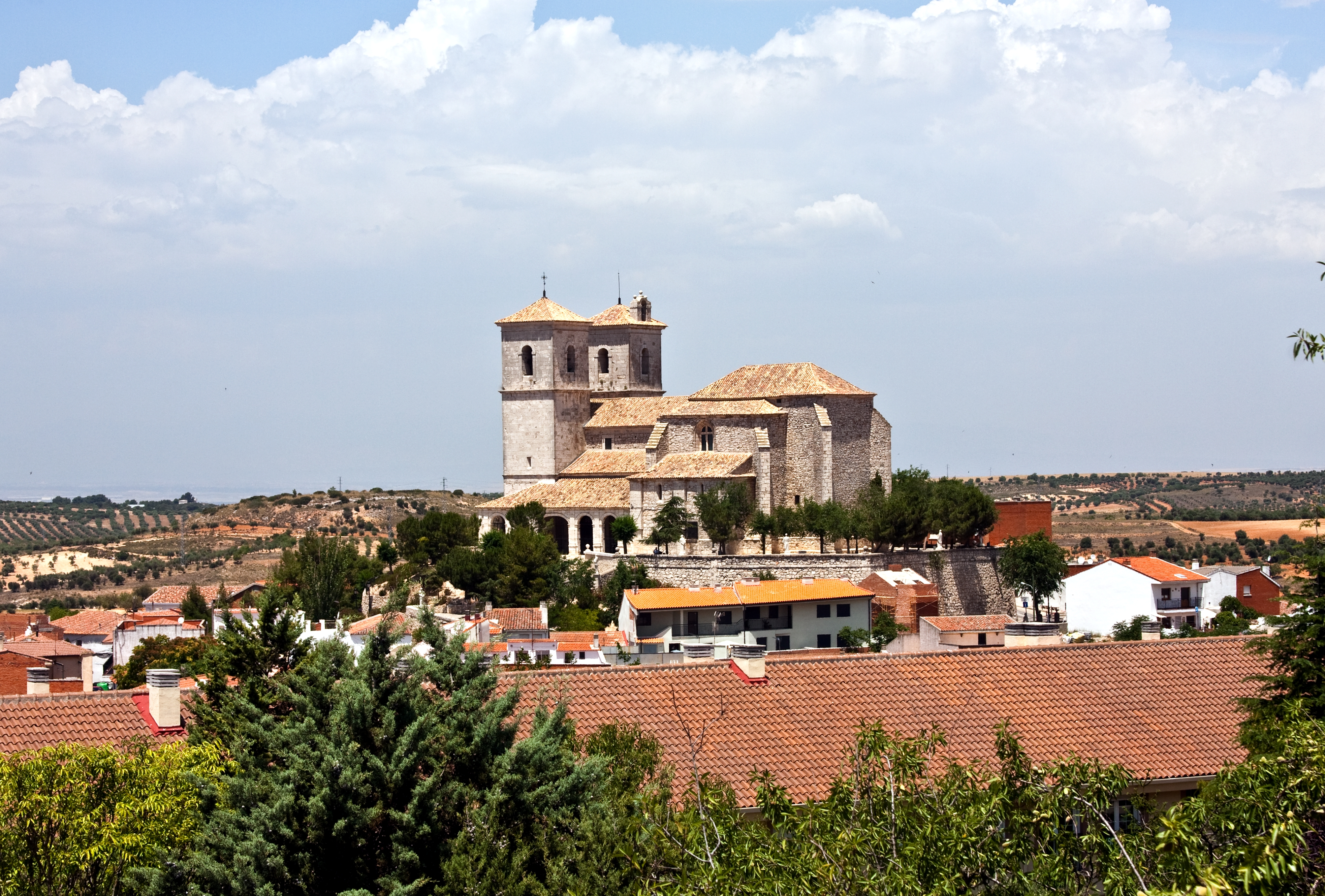 Campo Real - Santa Maria del Castillo17